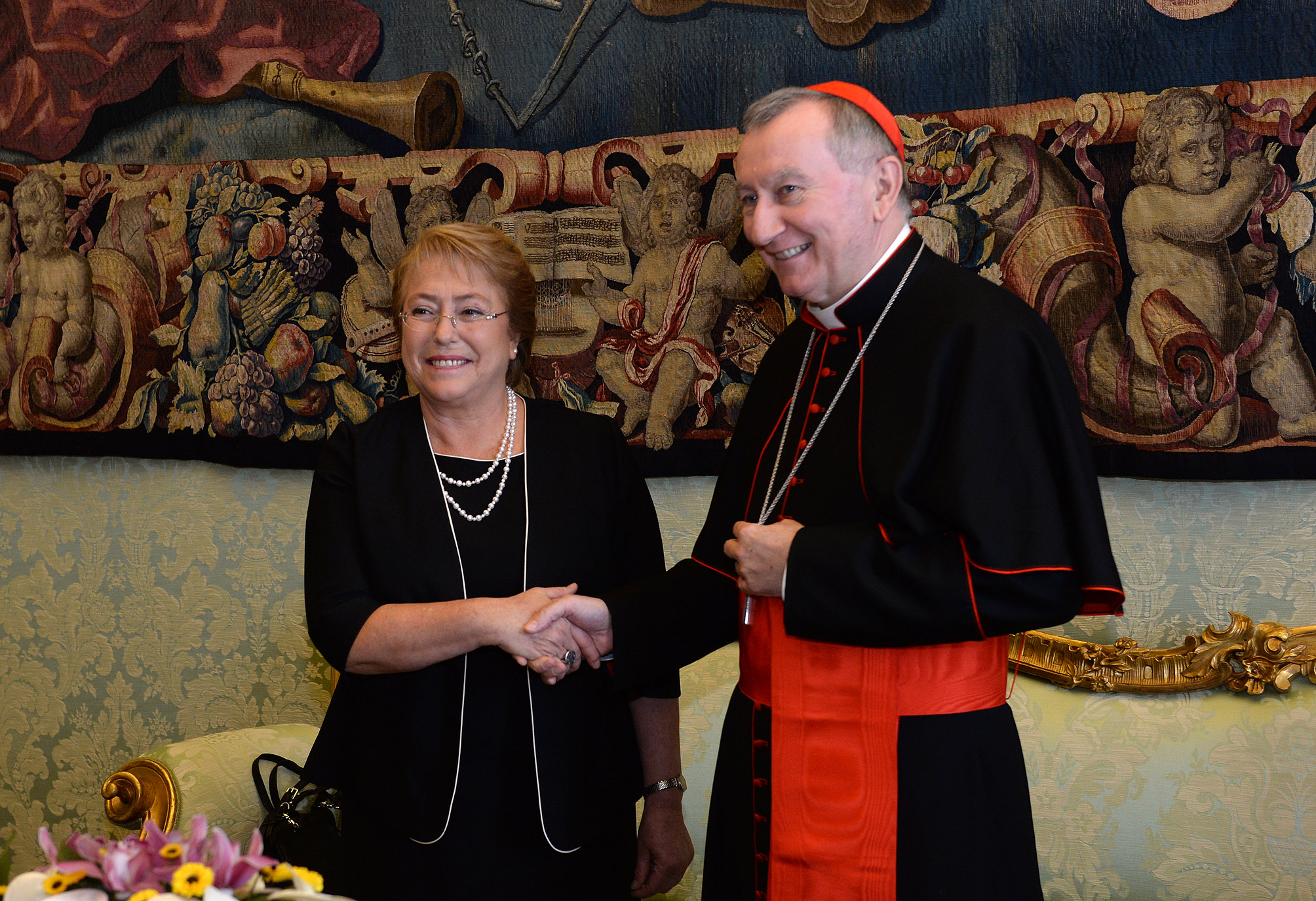 Gobierno de Chile